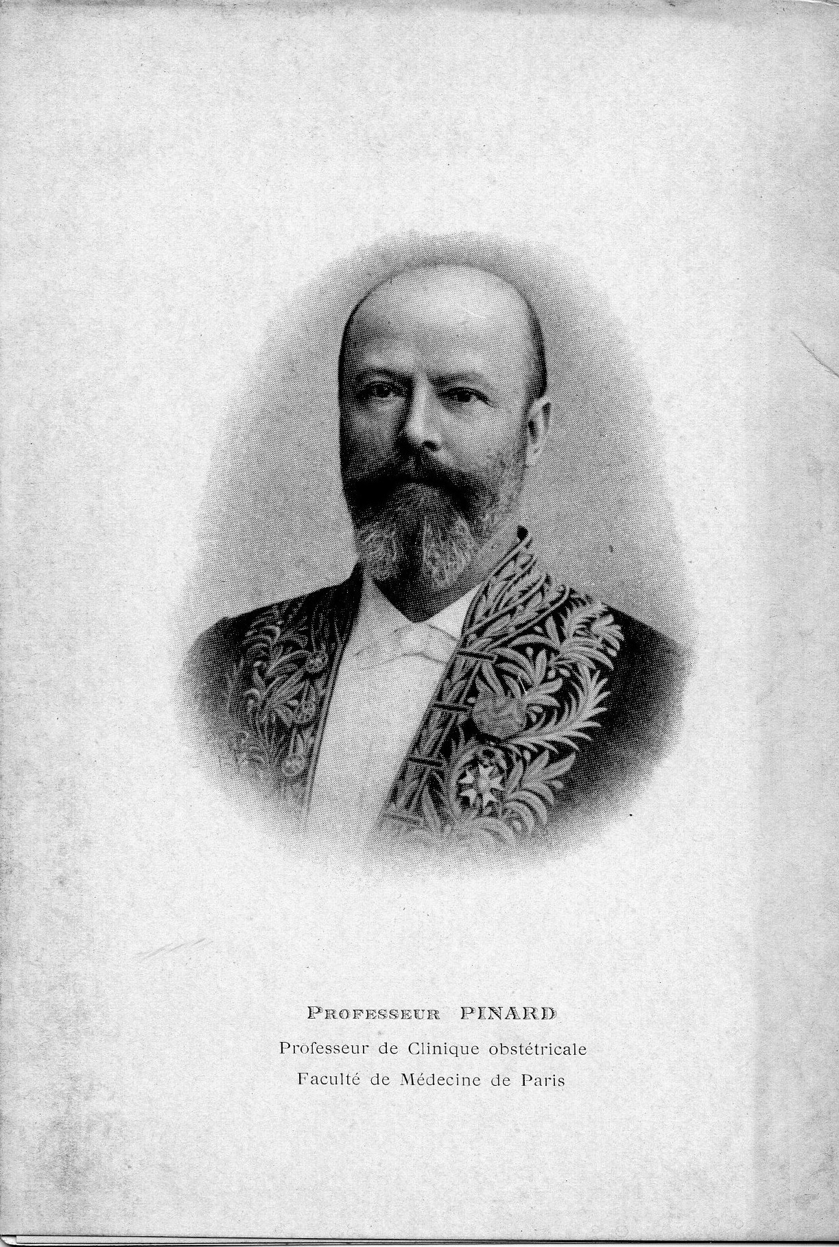 Foto di Adolphe Pìnard, docente di Clinica Ostetrica presso la facoltà di Medicina di Parigi.